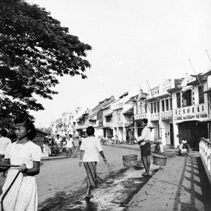 Repronegatief. Glodok, Djakarta, West-Java